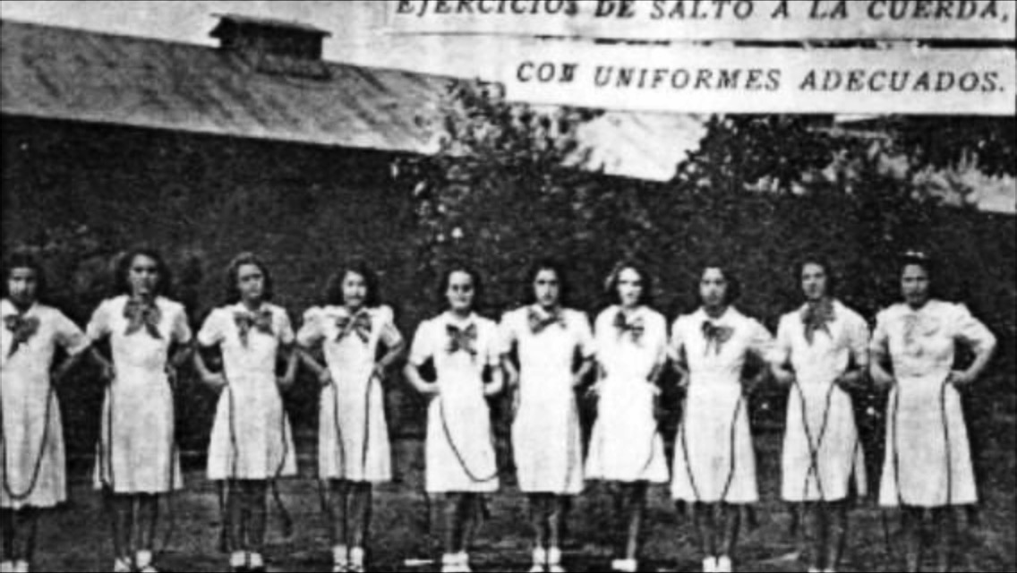 Clase de educación física en el instituto Belén en la década de 1940.